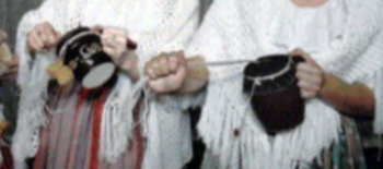 Fotografie fanfrnochů při koledování v roce 2000.